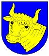 znak obce Žerčice.